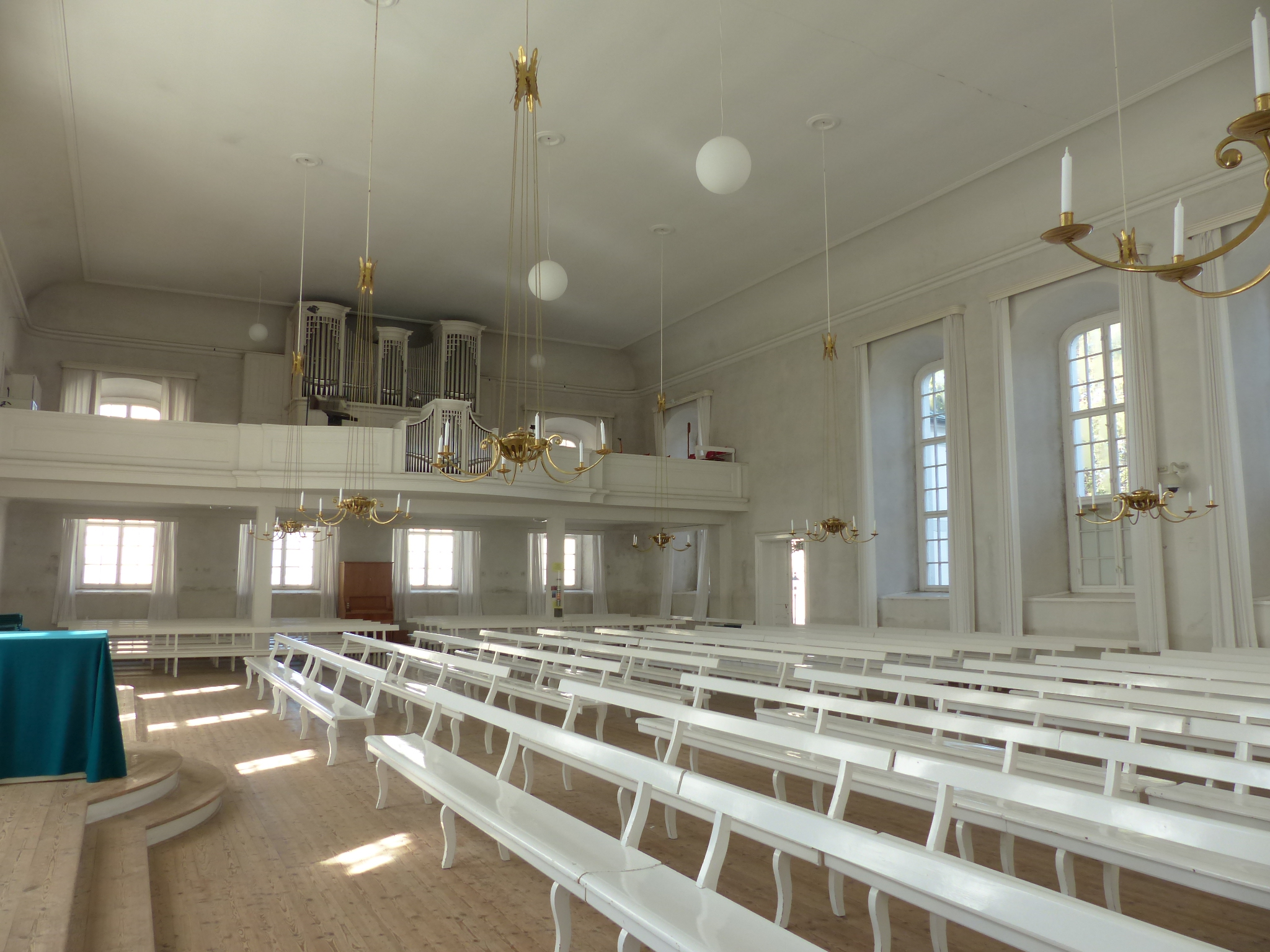 Betsaal der Herrnhuter Brüdergemeine, Zinzendorfplatz, Herrnhut